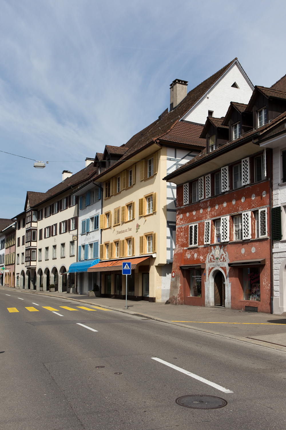 Denkmalgeschützte Häuser an der Schwertgasse in Bad Zurzach